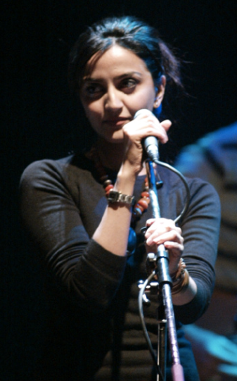 Reena_Bhardwaj_-_Bristol.png